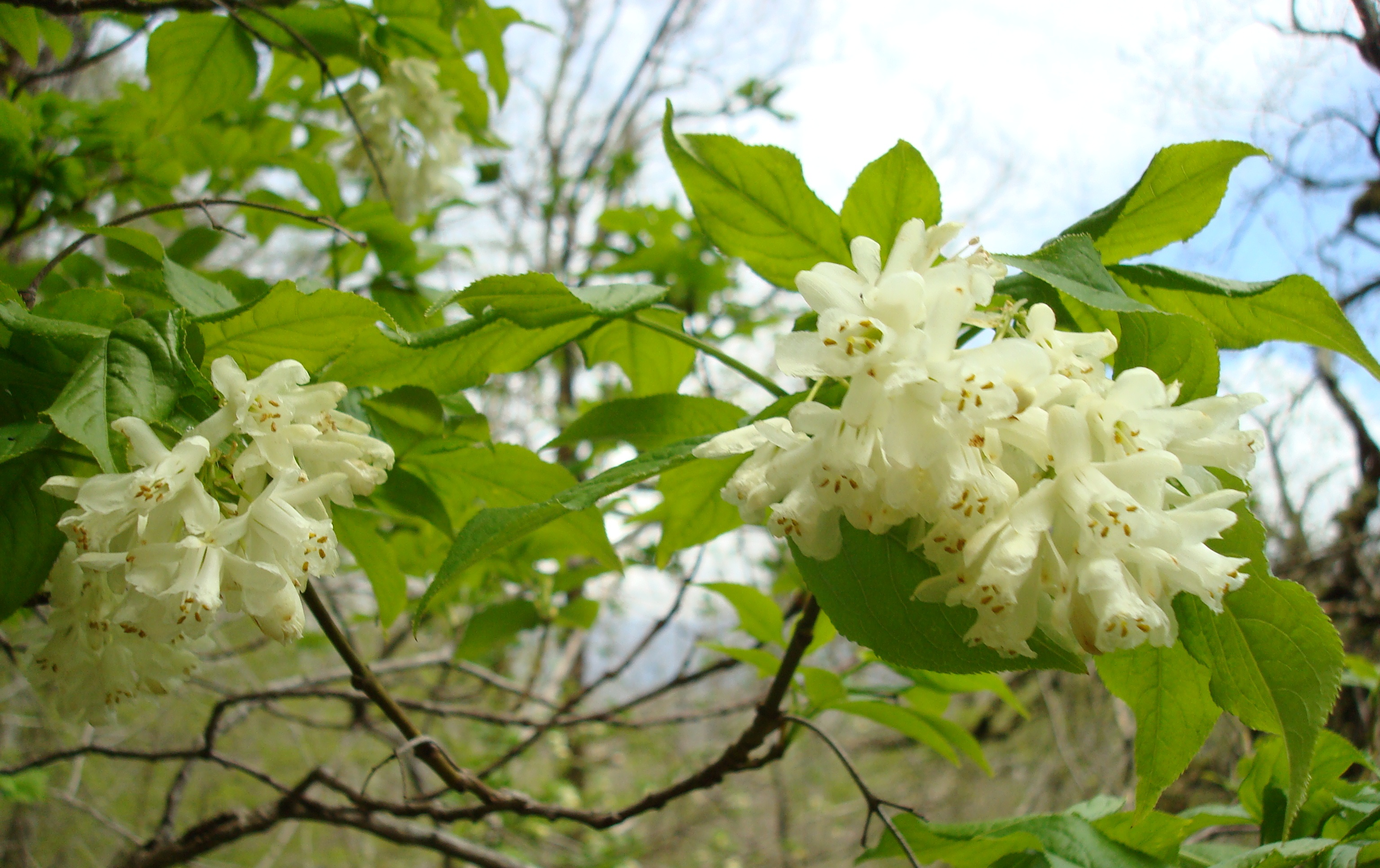 Цветы клека́чки колхидской или Джонджоли, или Стафи́лея колхидская (лат. Staphýlea colchica) — растение в виде кустарников или деревьев, встречающееся в Сочинском национальном парке. Цветы используют для приготовления приправ (грузинское джоджоли). Сочи This image is related to the protected area of Russia number 2300430